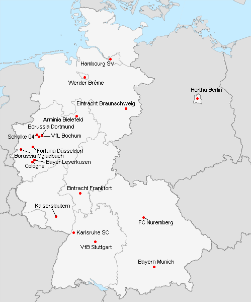 Répartition des clubs en 1.Bundesliga 1982-1983.